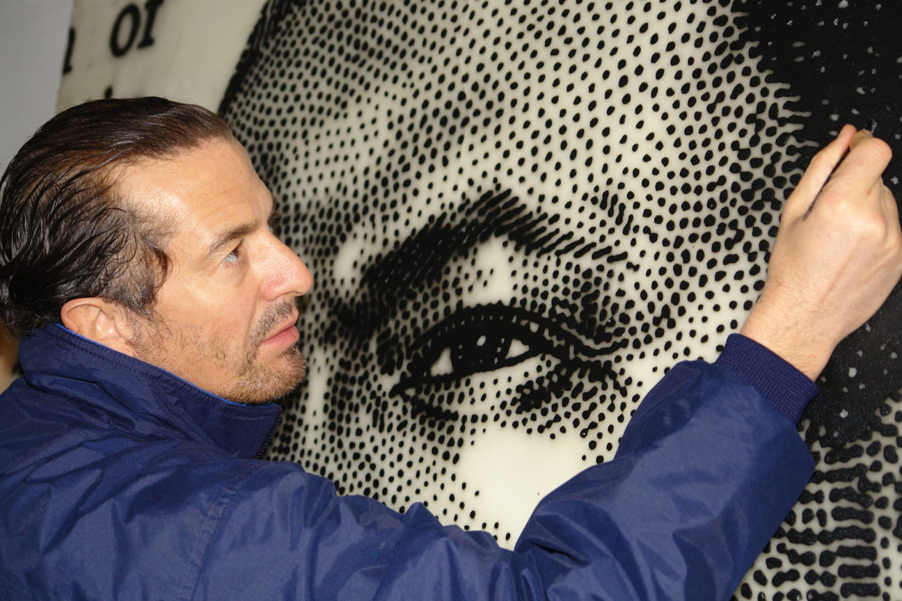 Jose Maria Cano retocando uno de sus cuadros